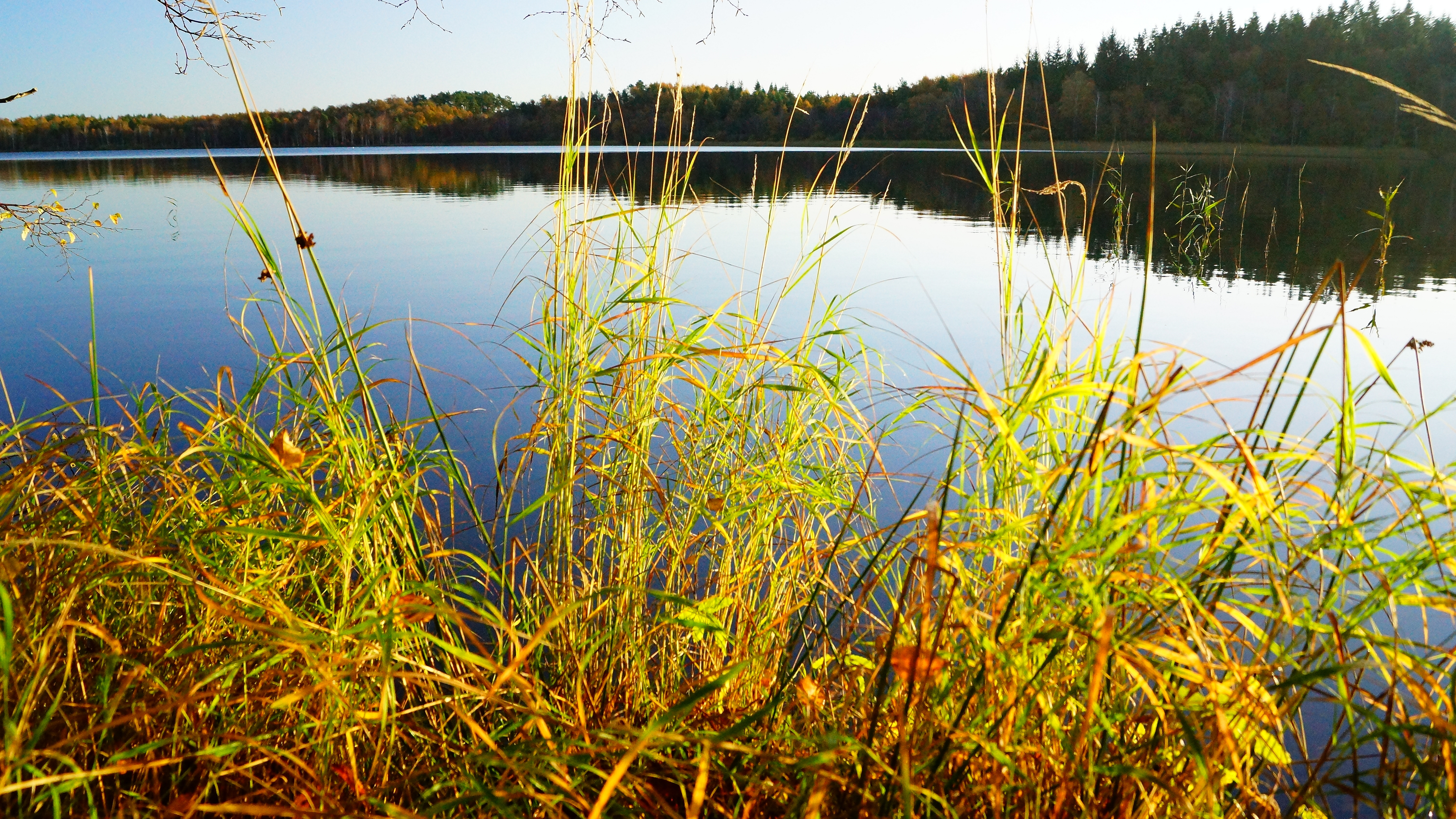 Øjesø total 2